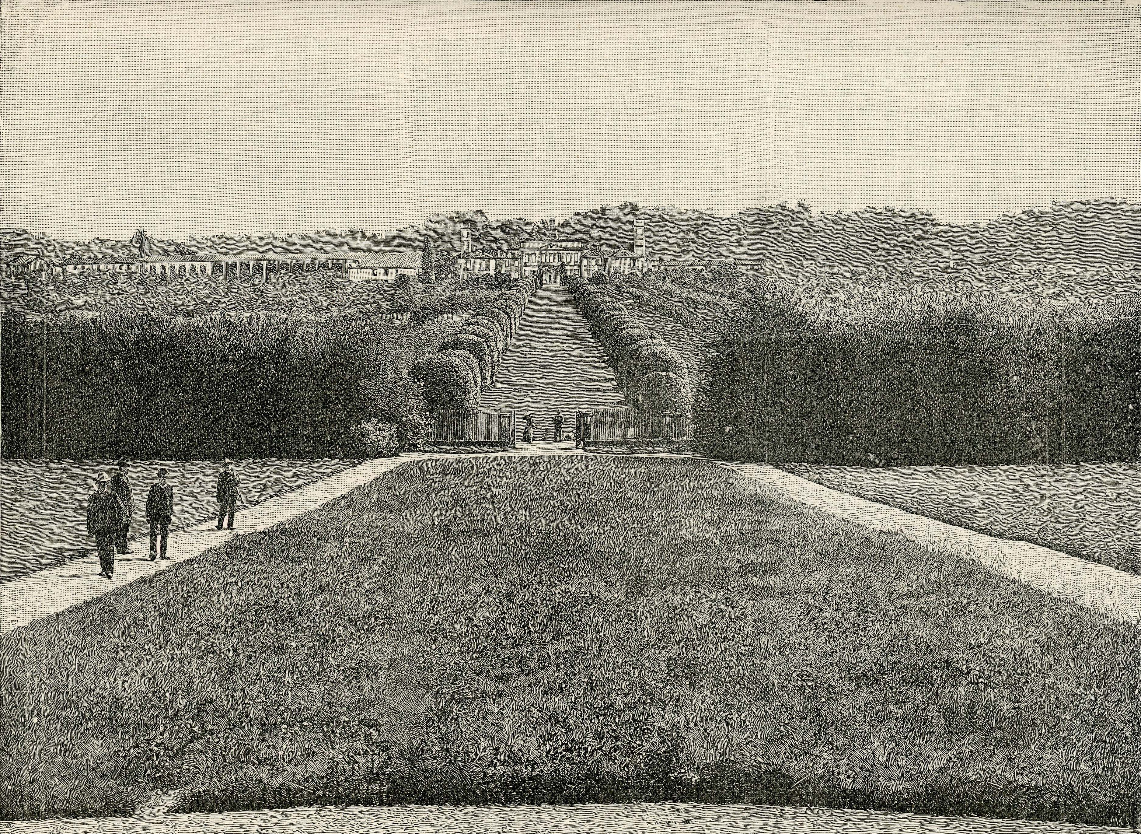 Monza: il Viale dei Palloni, nella Villa Reale (xilografia di Ernesto Mancastroppa).